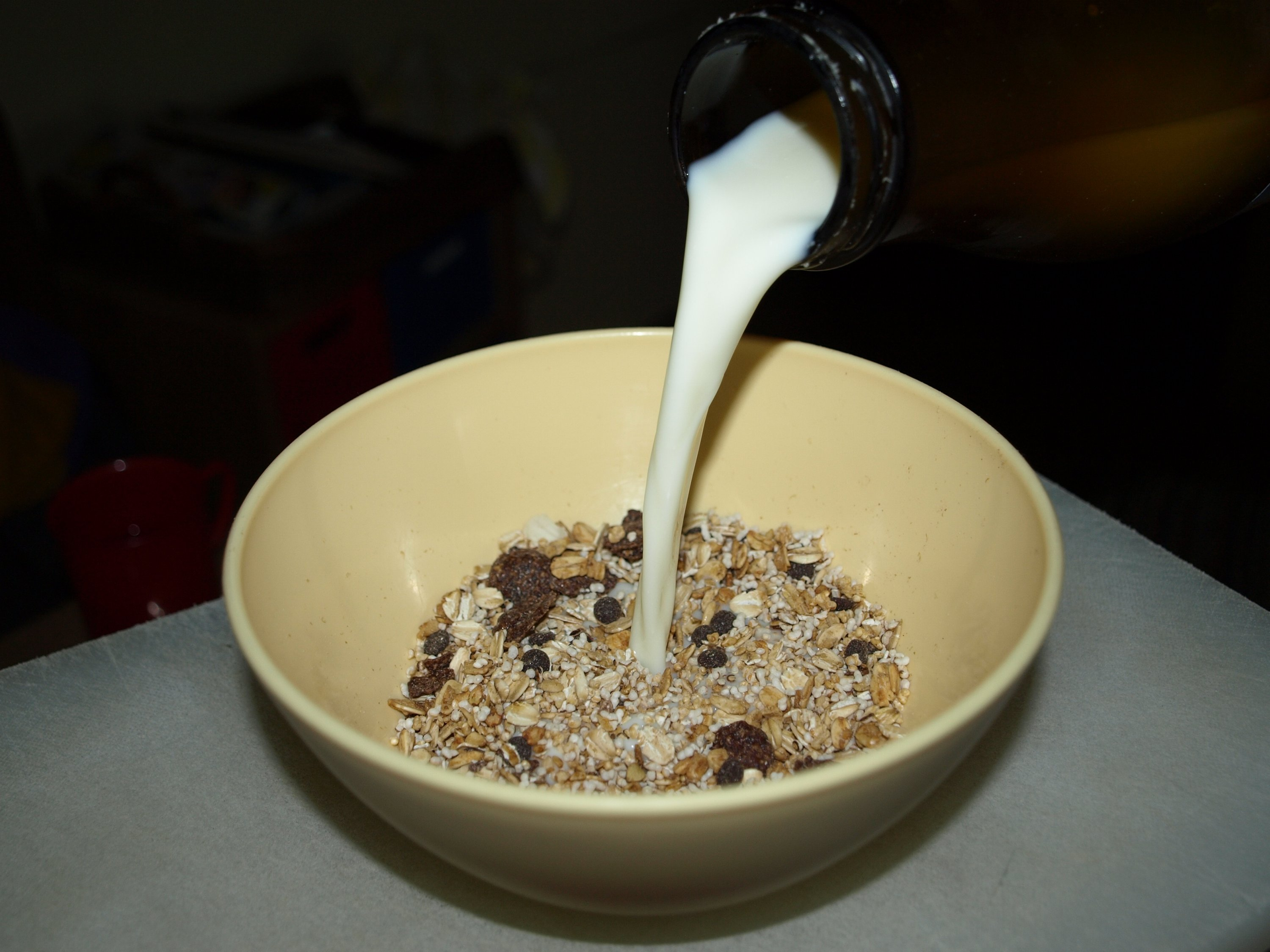 Amaranth-Müeslimischung